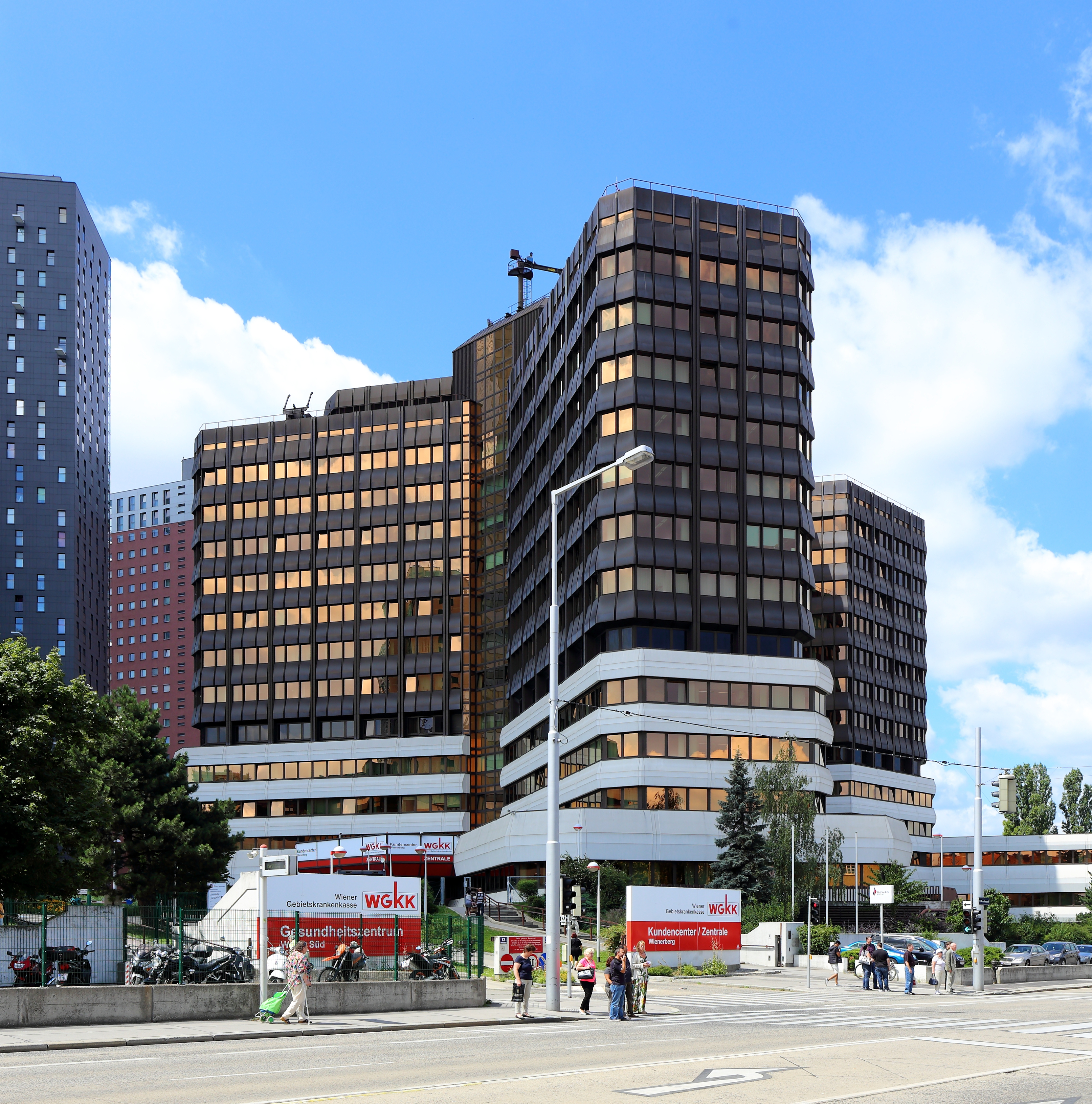 Zentrale der Wiener Gebietskrankenkasse an der Adresse Wienerbergstraße 15-19 im 10. Wiener Gemeindebezirk Favoriten. Das Verwaltungsgebäude mit einem Y-förmigen Grundriss wurde von 1977 bis 1981 nach Plänen des Architektenduos Thomas Reinthaller und Franz Requat errichtet und am 15. Oktober 1981 eröffnet.